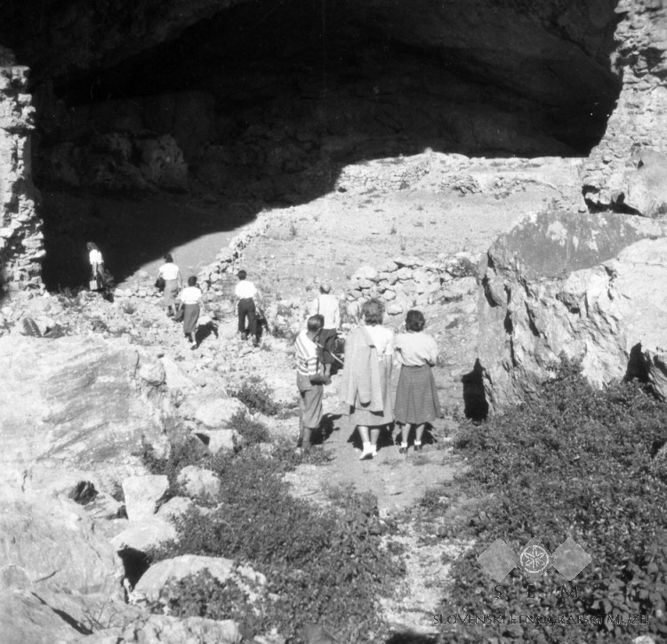 Ospski grad ali "Jama" in etnografi.